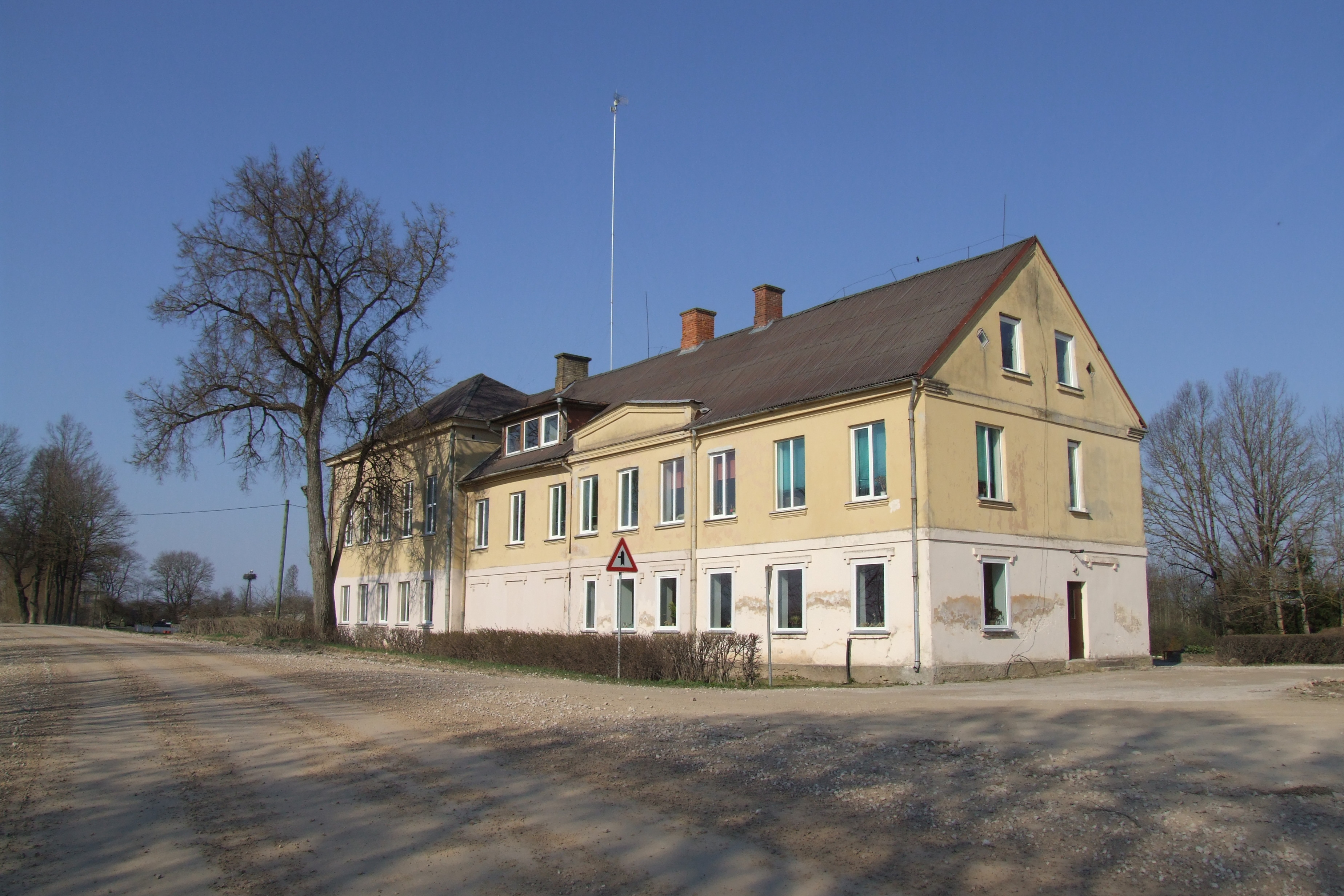 Bij. Bārbeles pamatskola, 25.04.2011.